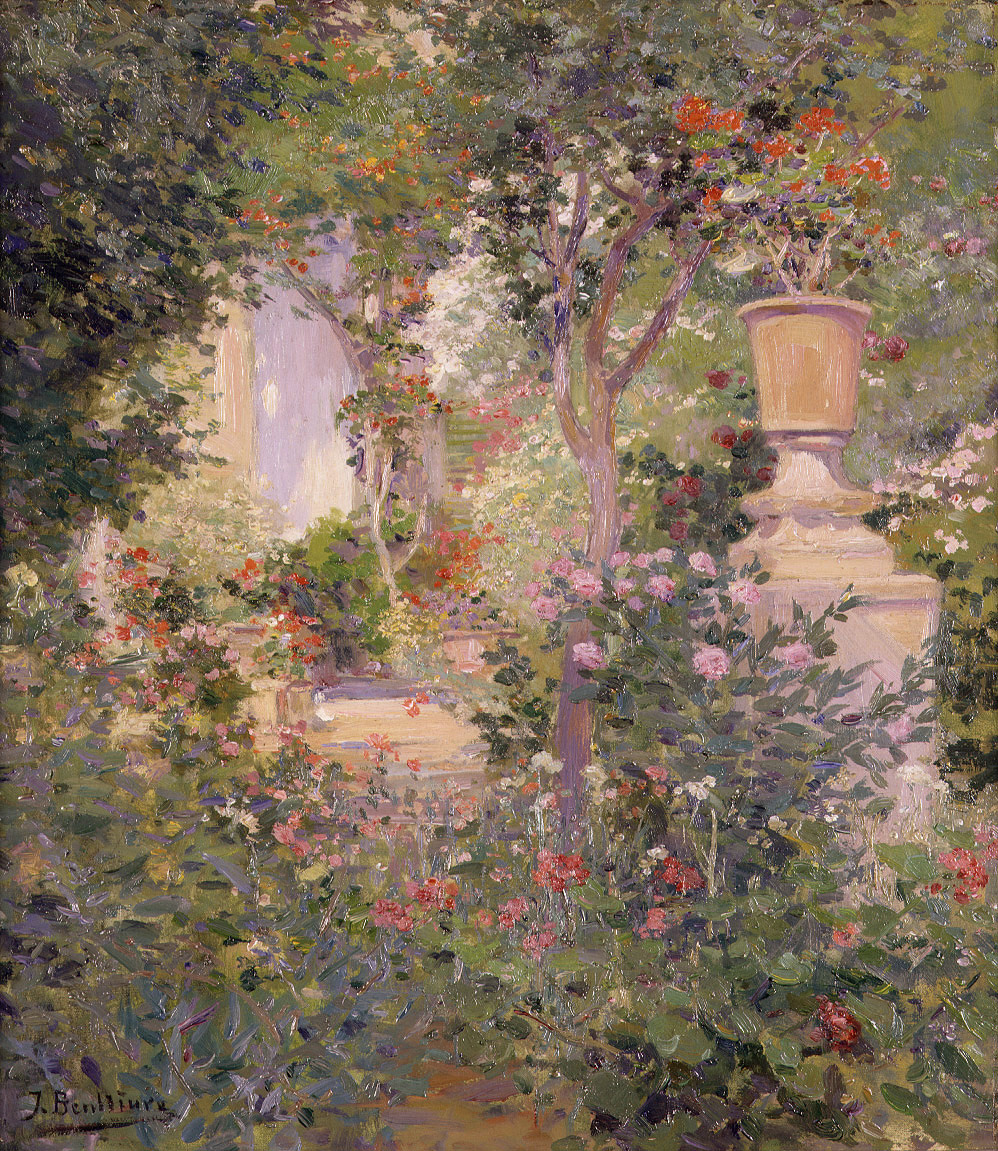 La obra representa el jardín del pintor español José Benlliure Gil (1855-1937).